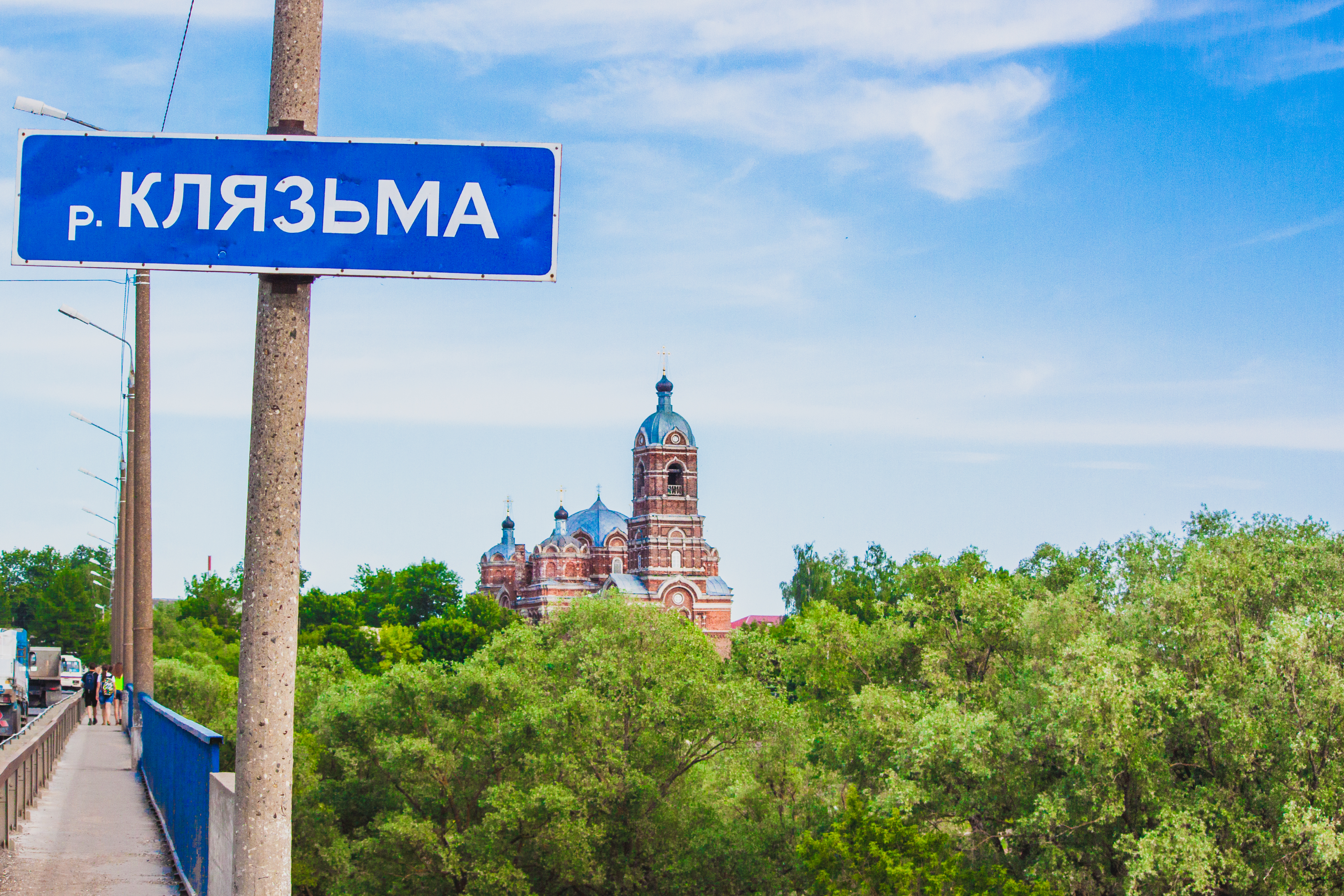 Собор Спасо-Преображенский (Владимирская область, Ковров, улица Першутова, 28)